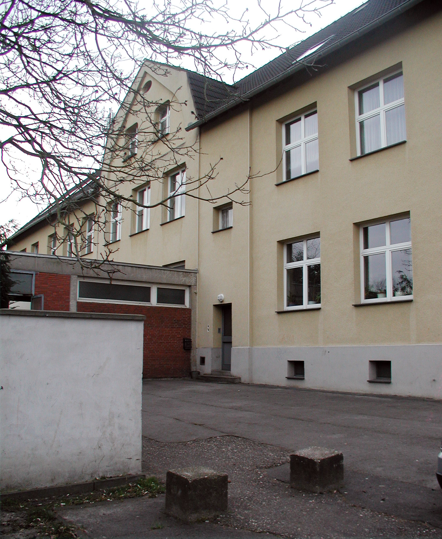 Brühl-Heide, alte Volksschule